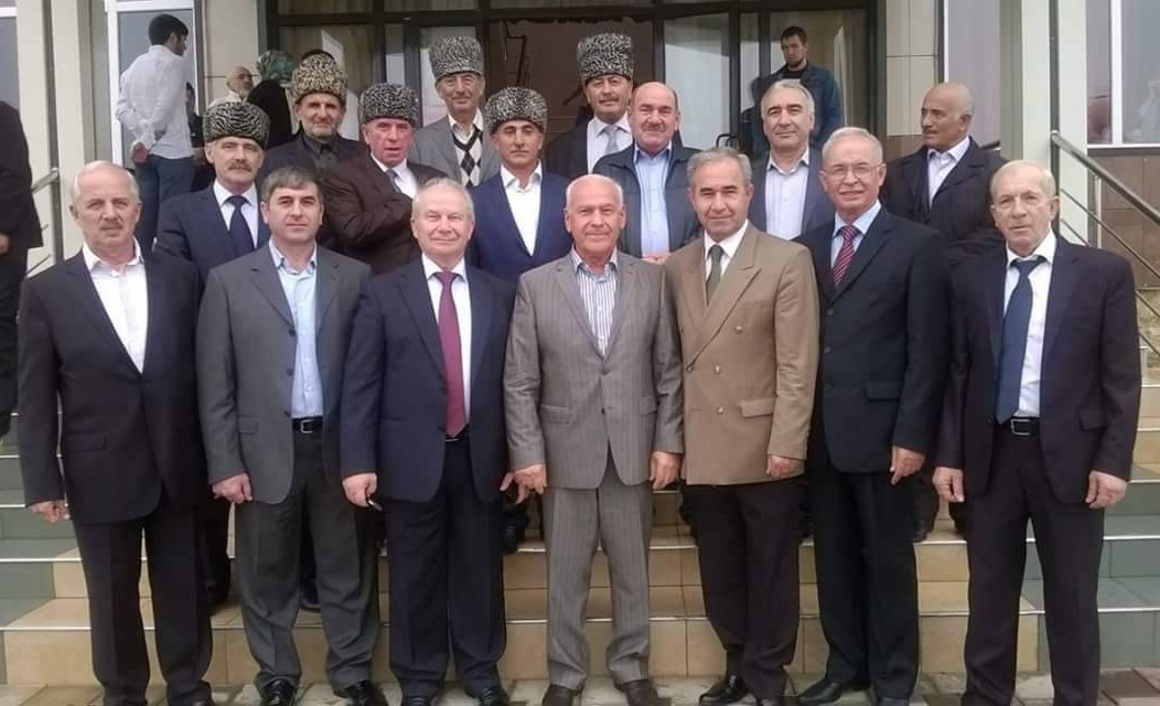 Дружеская встреча представителей тайпа Гендаргеной в Гудермесе. (Примечание, ранее фотография мною публиковалась на Фейсбуке и чеченском сайте . если возникнут вопросы, могу удалить фотографию с этих сайтов).